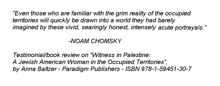 Chomsky Baltzer book review